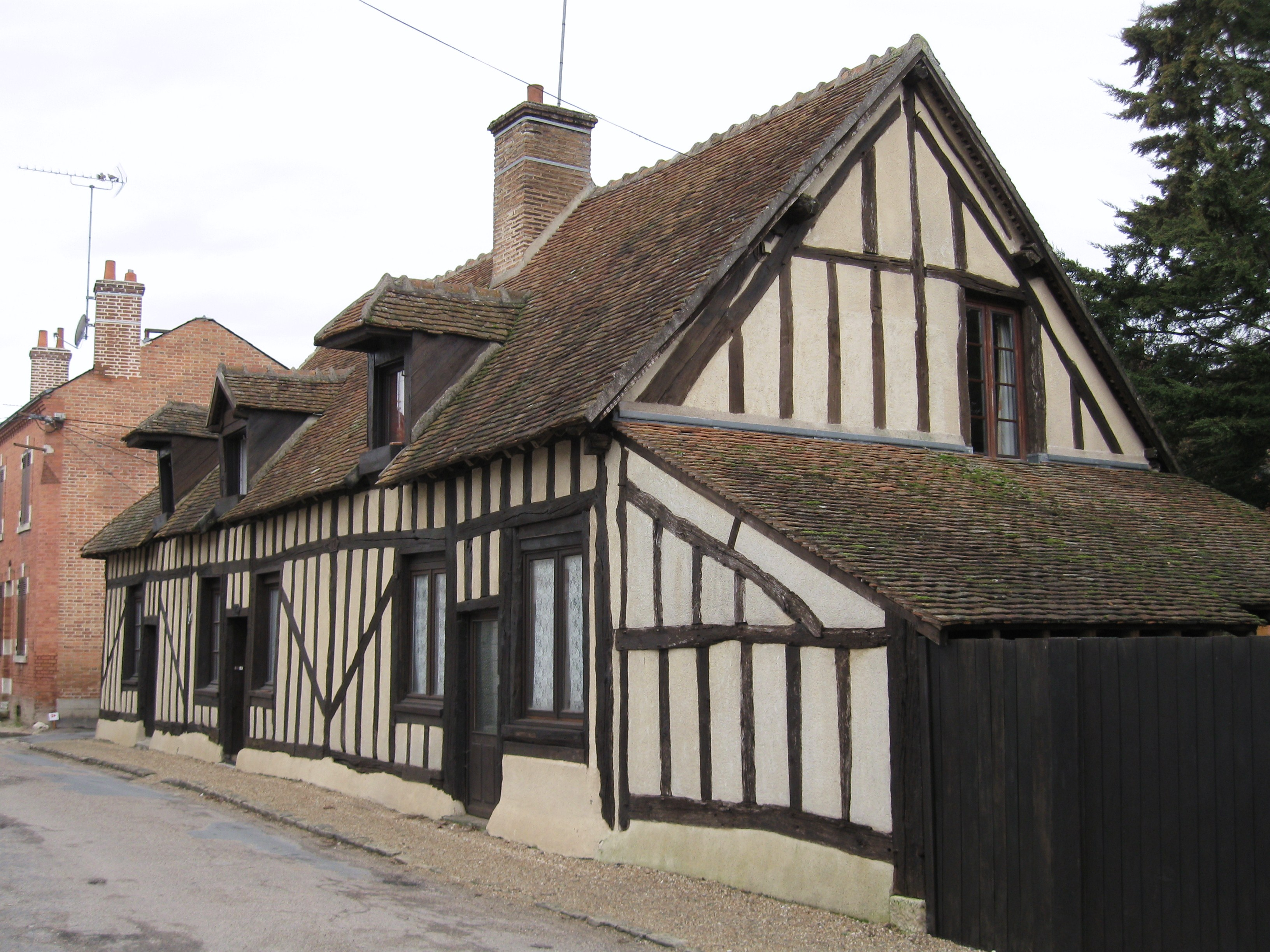 Maison à colombage rue Saint Michel, La Ferté-Saint-Aubin, Loiret, France